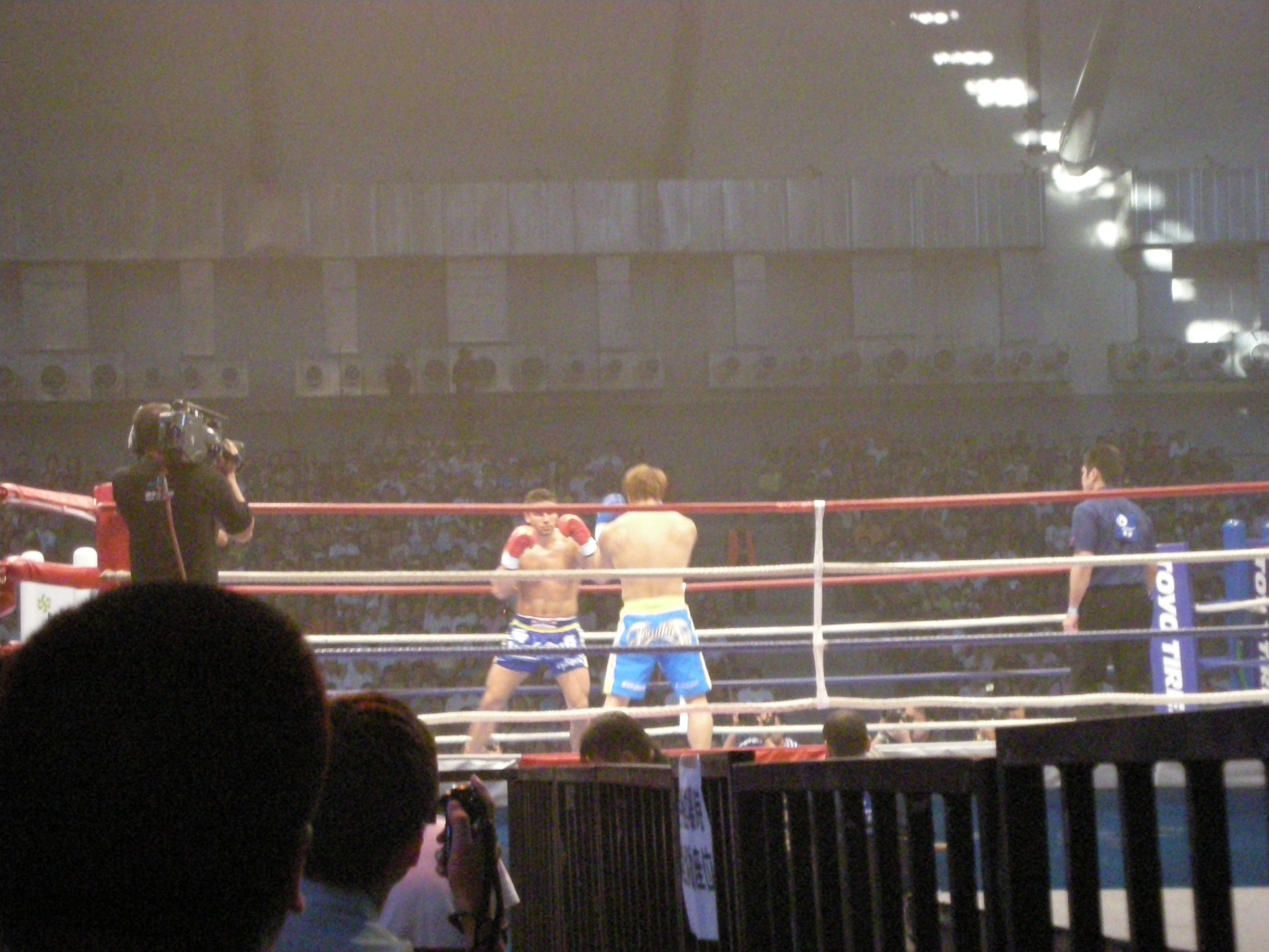 2008 K-1 Taipei GP fight